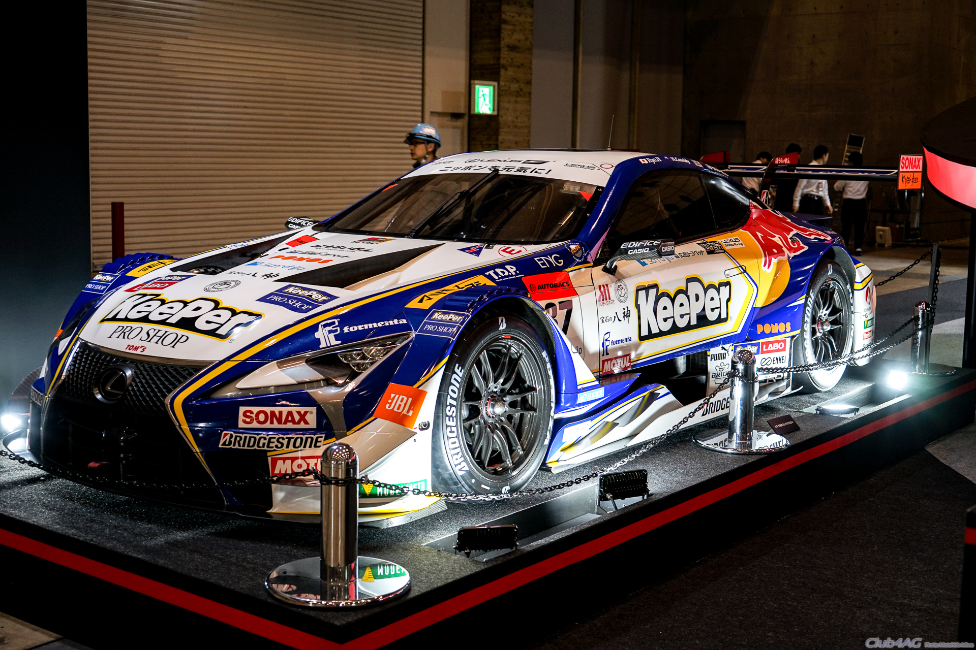 Tokyo Auto Salon 2019